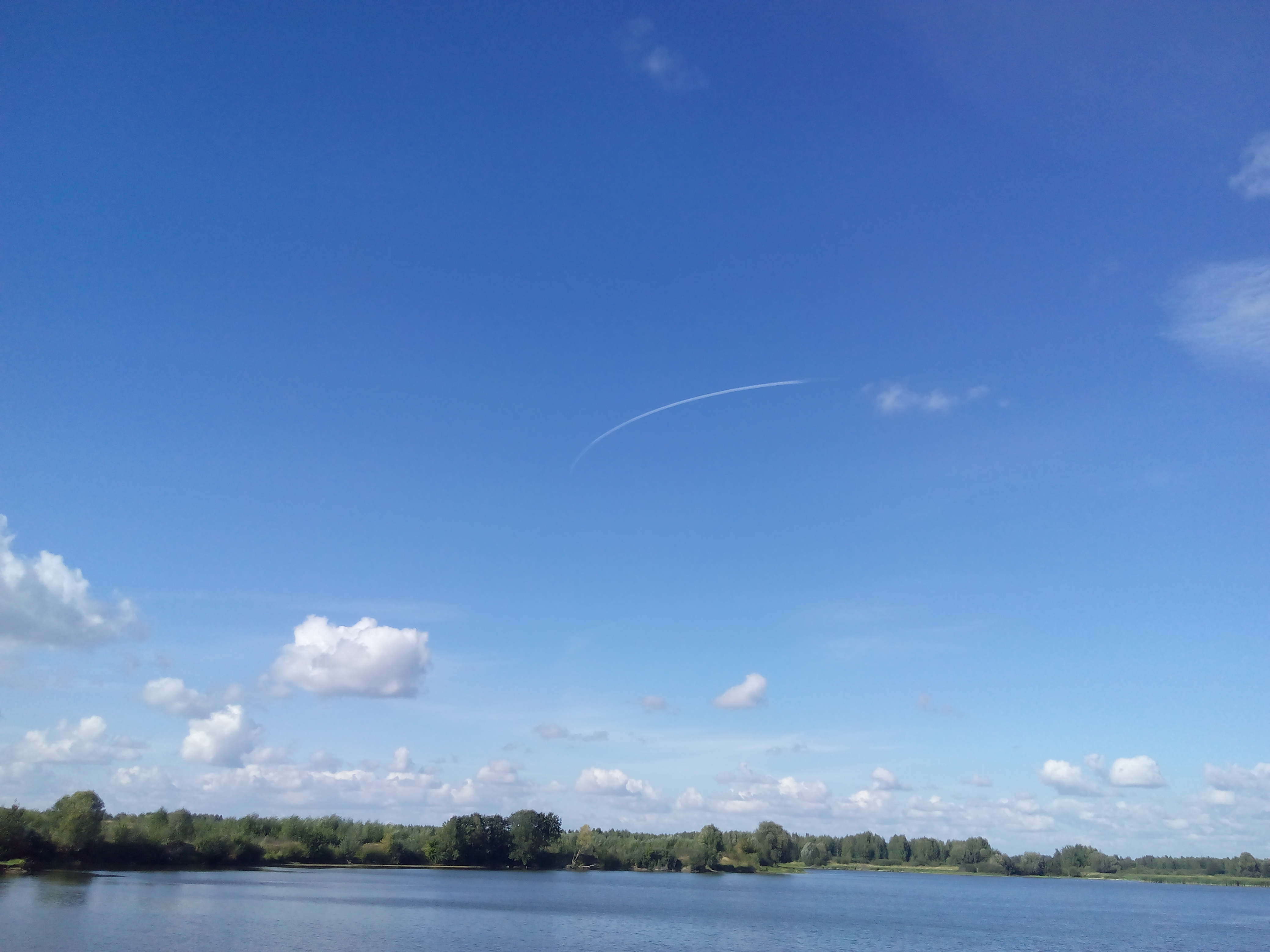 Испытательный полет Ту-160М в небе над Казанью неподалеку от аэродрома Борисоглебское Казанского авиационного завода.